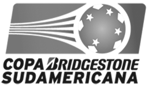 Logo de la Copa Sudamericana